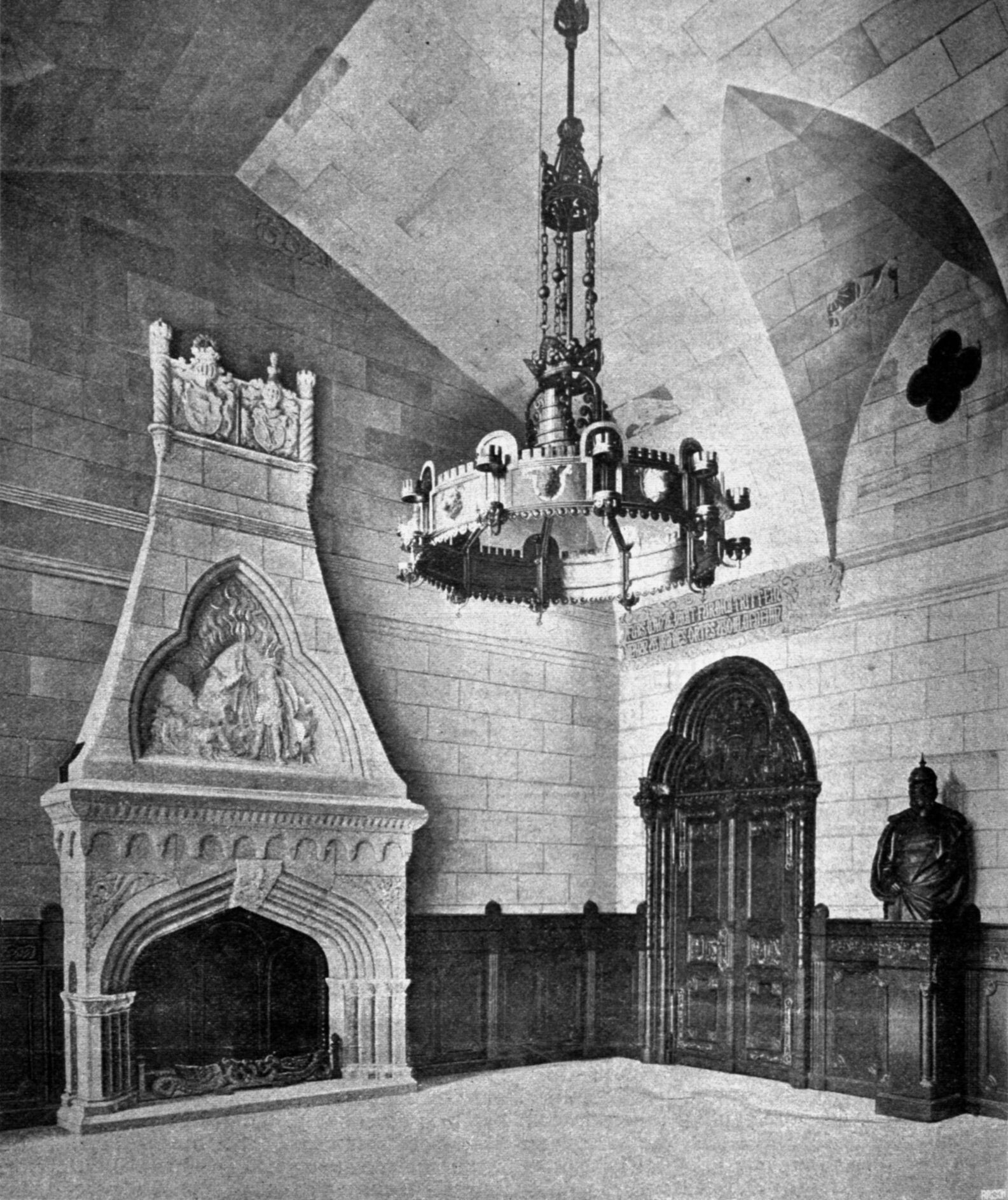 Berlin, Rathaus Schmargendorf, Ratssaal